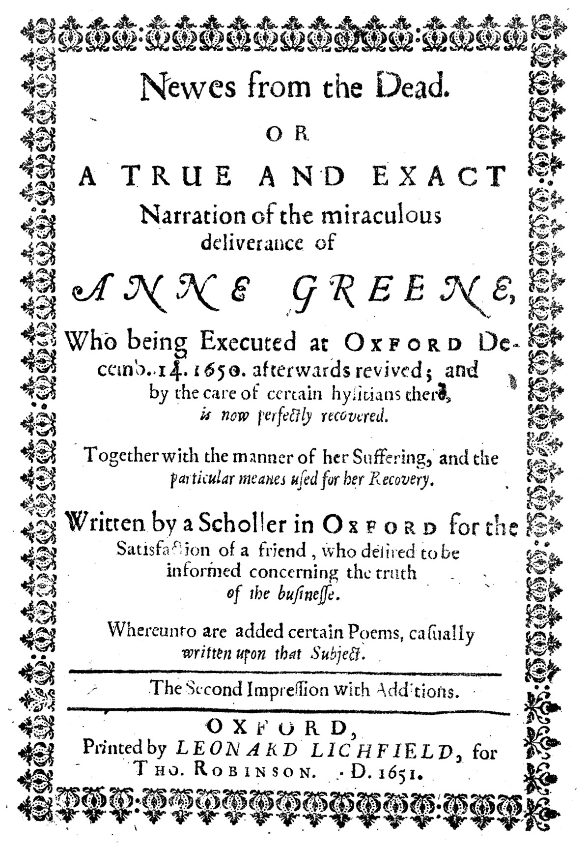 Title page. Rare Books Keywords: epb; watkins, r.; Catalepsy